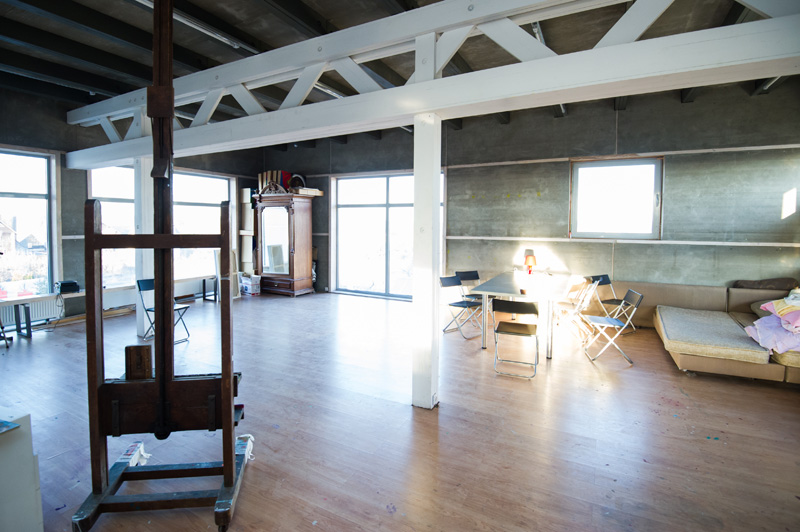 Мастерская Гридчинхолла